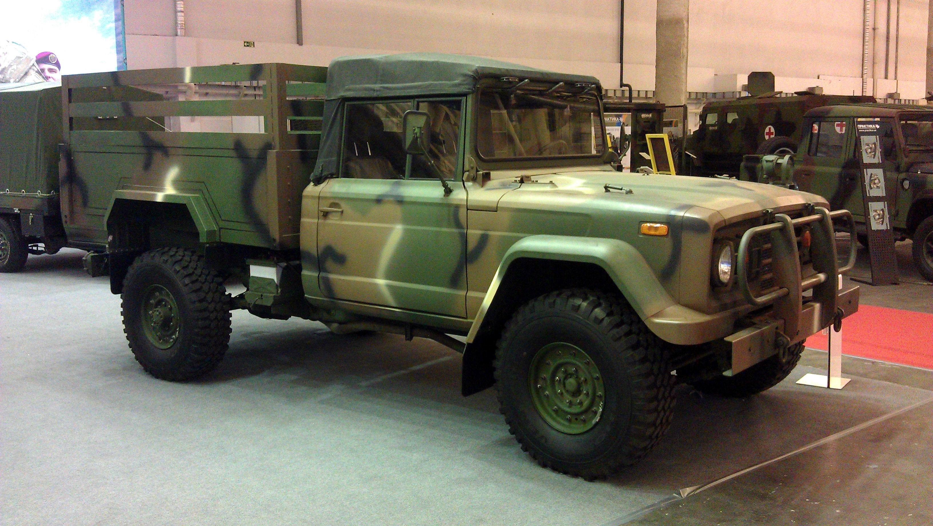 Легкий армейский грузовик KIA Military KM-450 на стенде корпорации "Богдан". Выставка "Зброя та безпека", Киев, сентябрь 2015 г.